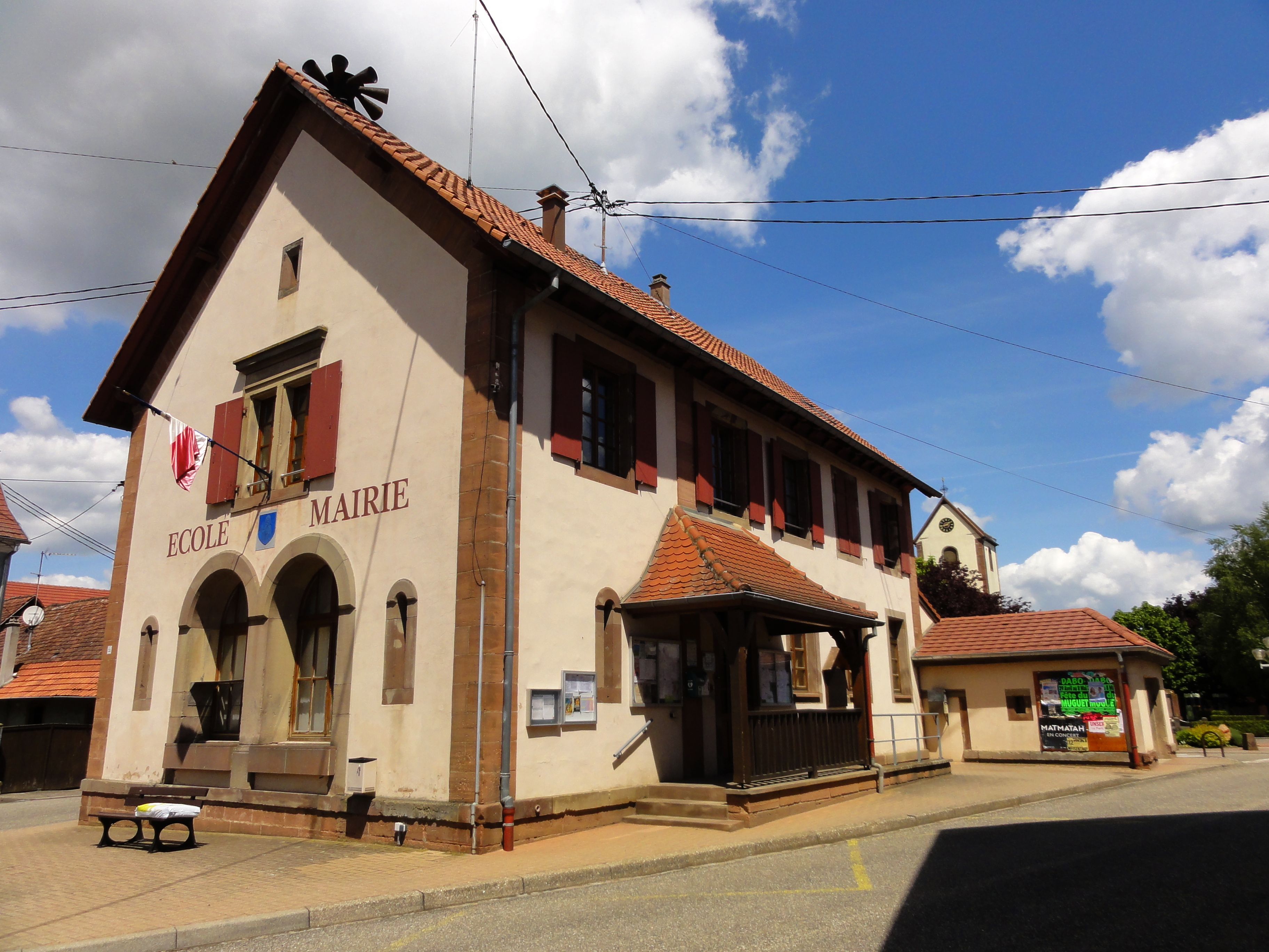 Alsace, Bas-Rhin, Ringendorf, Mairie.